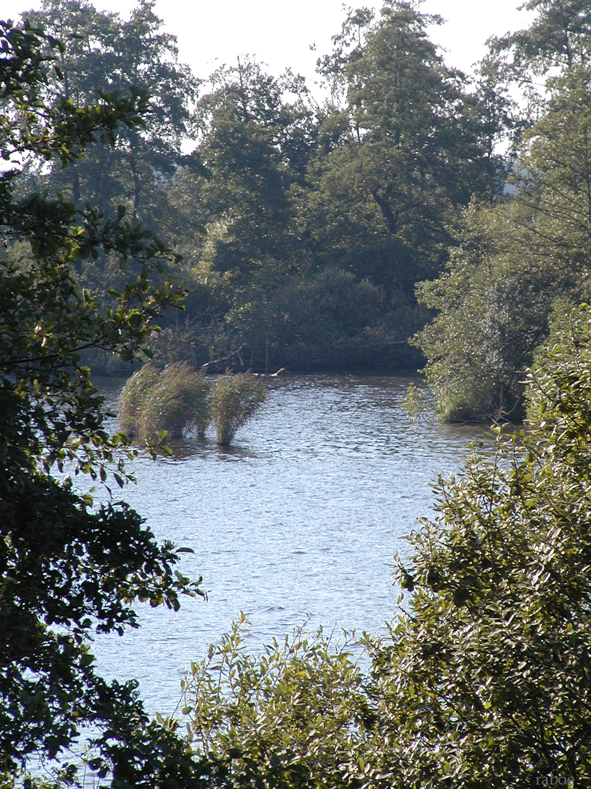 der Balksee, im Licht der Baume